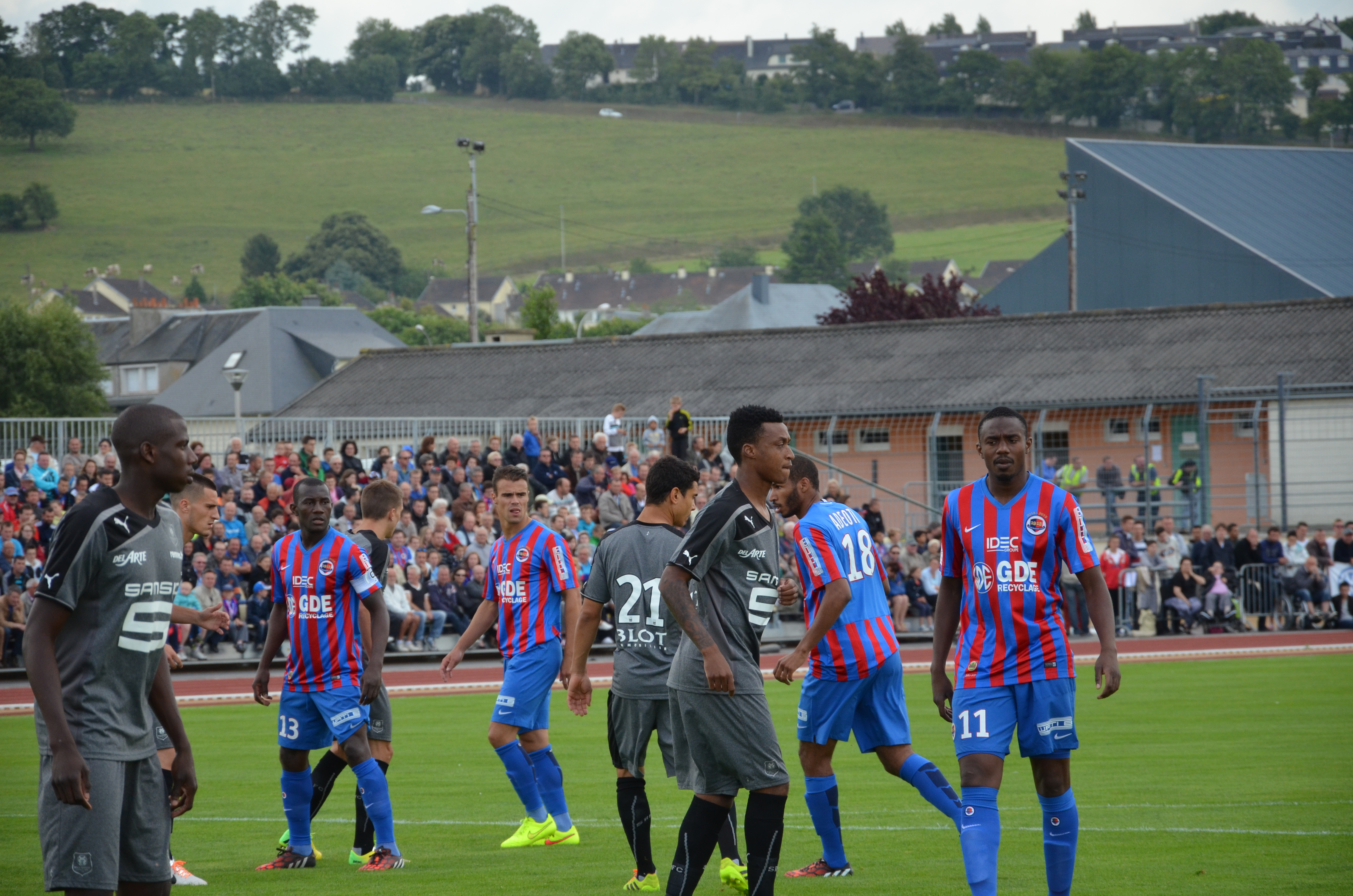 Photographie prise à l'occasion de la rencontre amicale opposant le Stade Malherbe de Caen au Stade rennais, le 9 juillet 2014 au stade Pierre-Comte de Vire. Ici, joueurs des deux équipes rassemblés lors d'un corner pour Caen.